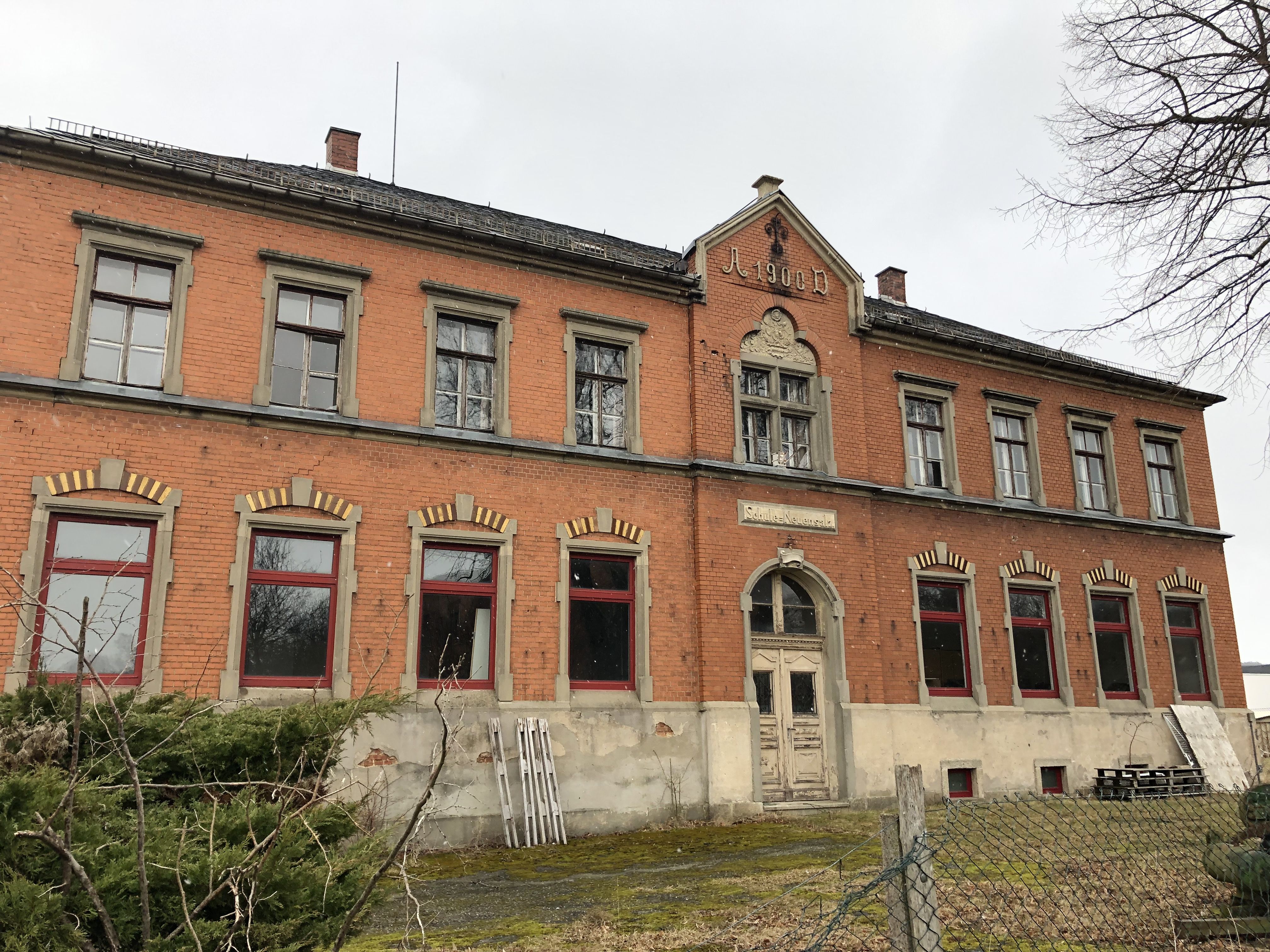 Schule Neuensalz